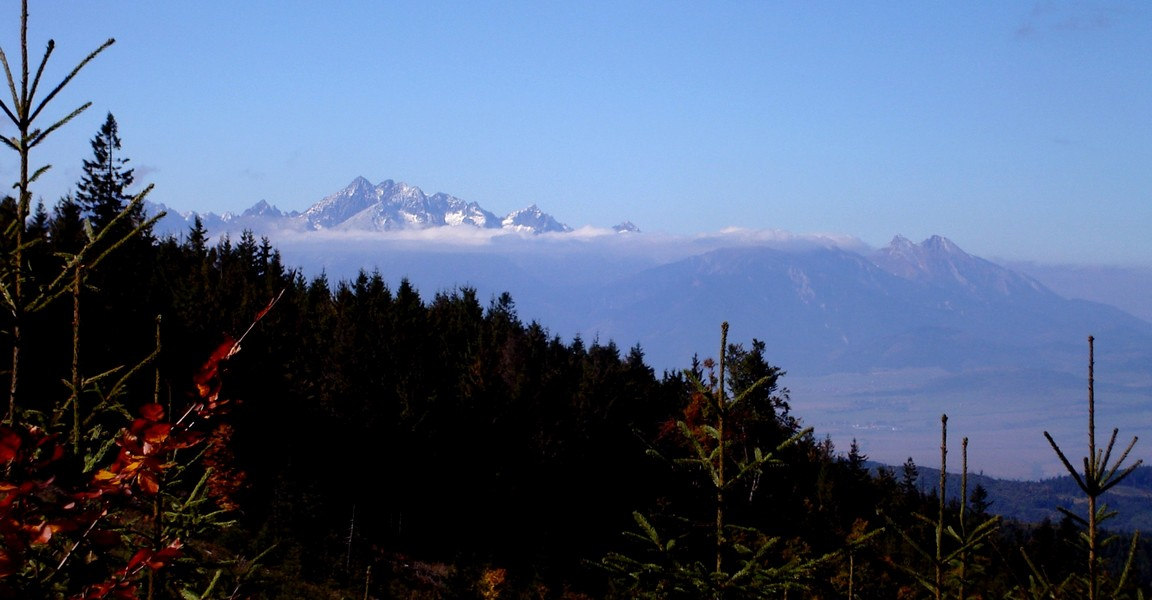 Lomnicky Peak and Belanske Tatry